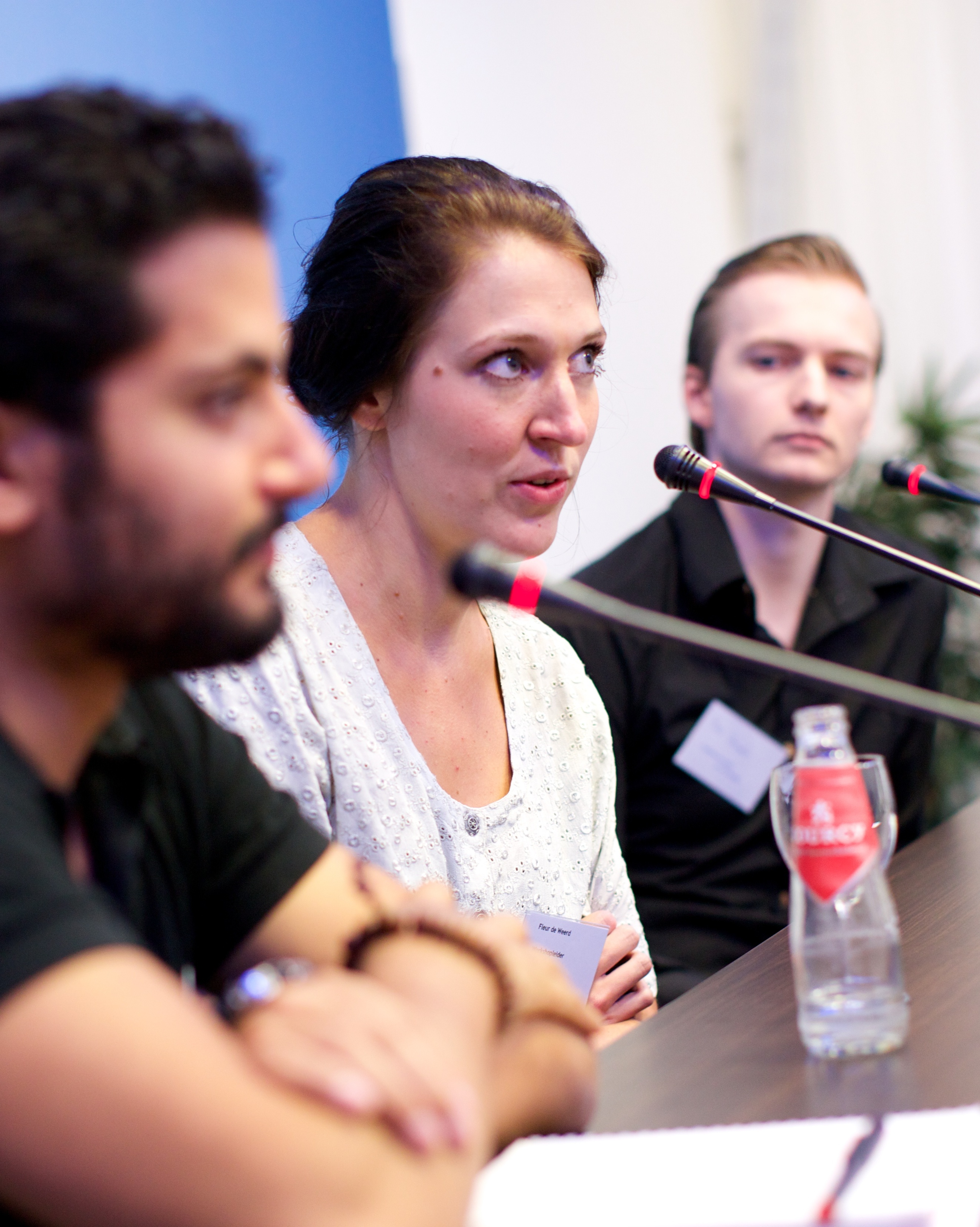 Op 27 september 2014 organiseerde de Nederlandse Vereniging van Journalistiek (NVJ) de Nacht van de Journalistiek in Nieuwspoort in Den Haag. Tijdens deze nacht konden bezoekers leren bloggen met Merel Roze, speeddaten met topfotografen, de ideale sollicitatiebrief leren schrijven, een masterclass presenteren volgen met Jeroen Overbeek, Leren Googlen met Henk van Ess, gouden tips opdoen voor een bloeiende freelancepraktijk, datajournalistiek, storydesign en nog heel veel meer over vernieuwende journalistiek en nieuwe kansen.